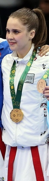 رزیتا علی‌پور در فینال مسابقات کاراته بازی‌های کشورهای اسلامی2017/باکو